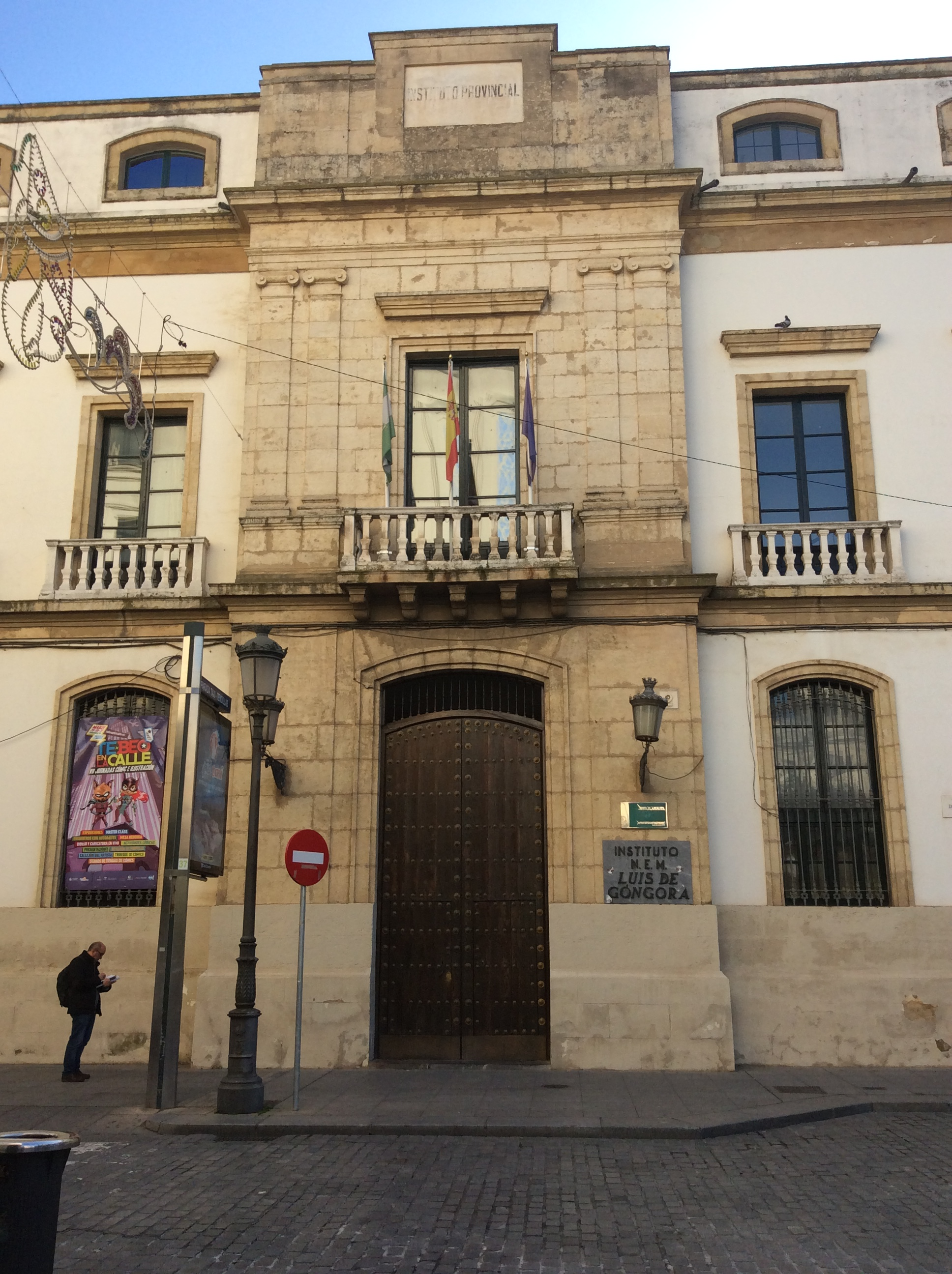 Puerta de entrada principal del Instituto Luis de Góngora (Córdoba). Imagen tomada desde la plaza de las Tendillas.